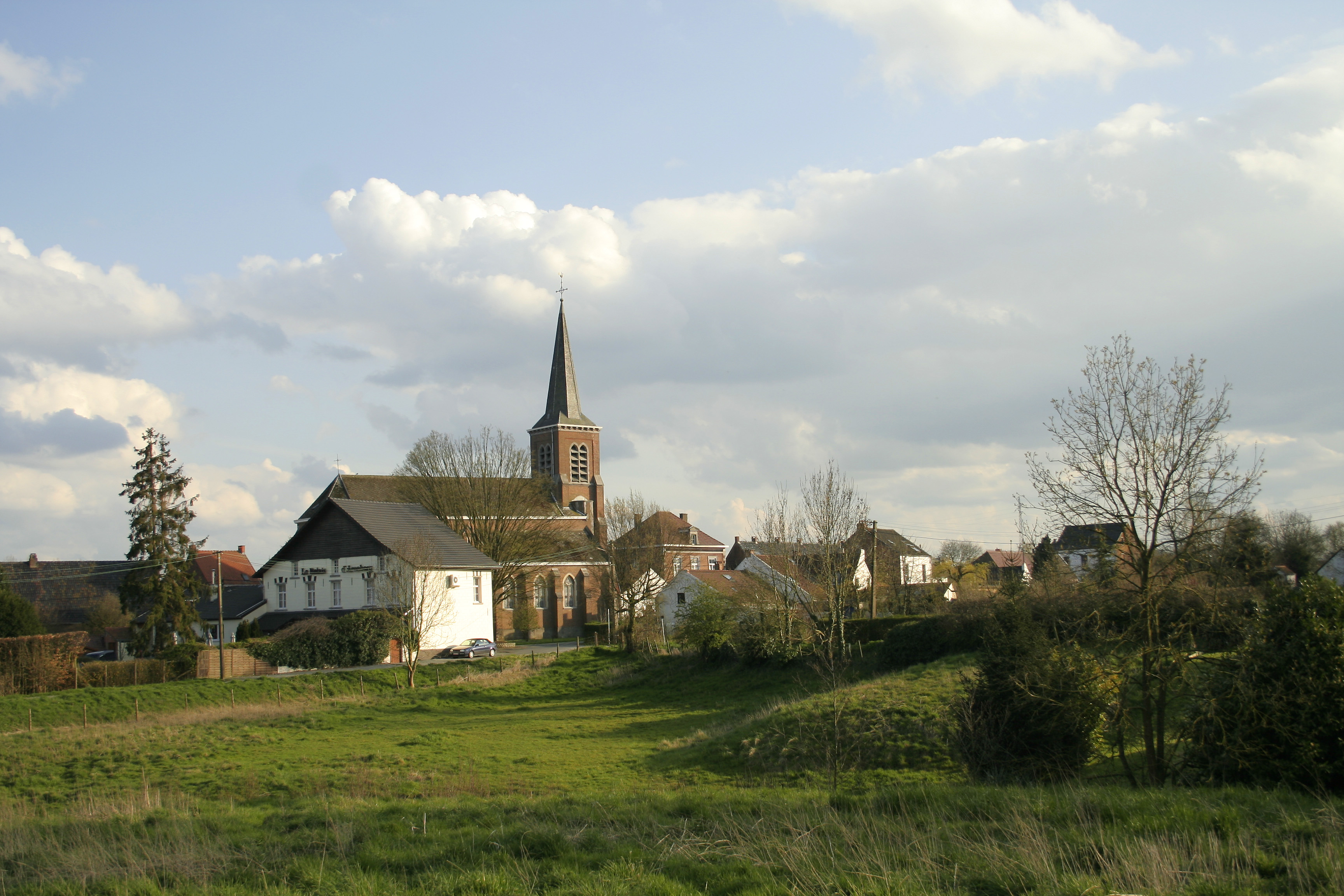 Wisbecq, le quartier de l'église Saint-Fiacre (1877).